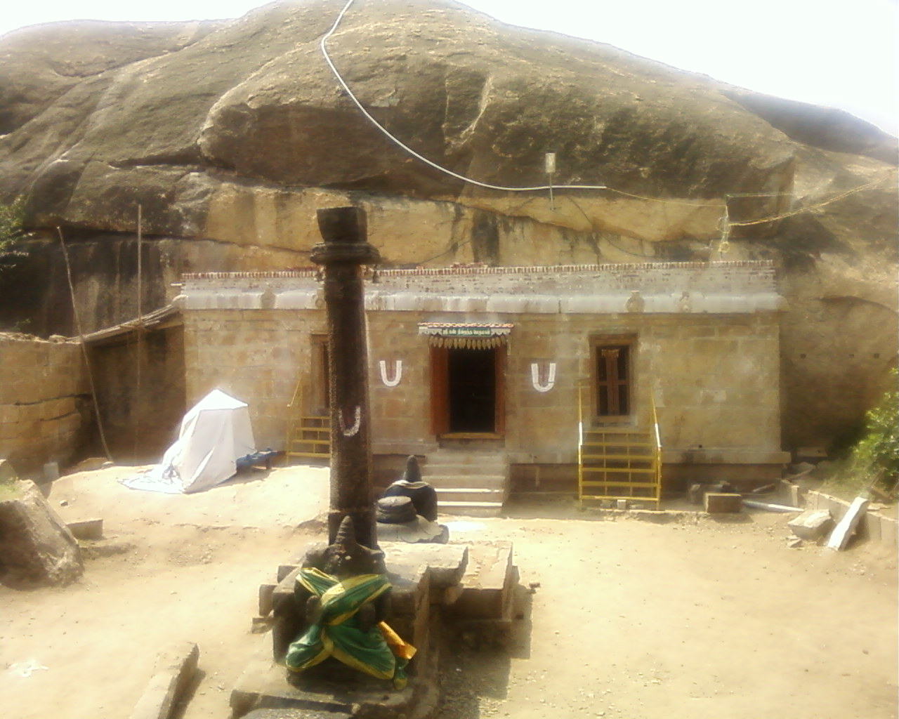 மலையடிப்பட்டி பள்ளிகொண்டபெருமாள் கோயில்